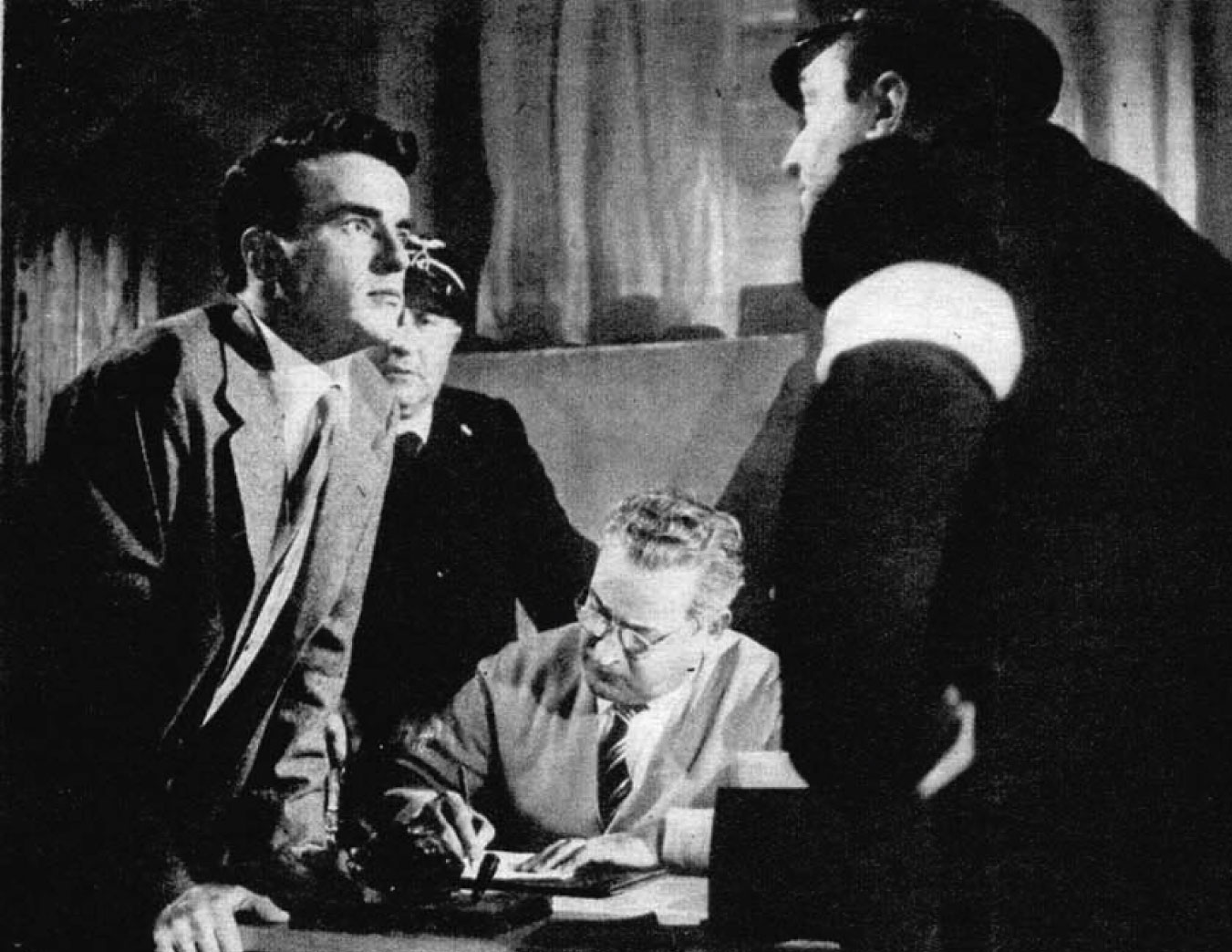 Montgomery Clift_Stazione Termini (De Sica_1953)